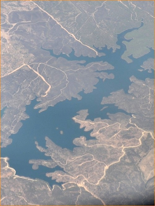 Le Rio Guadiana au Portugal, vu d'avion.